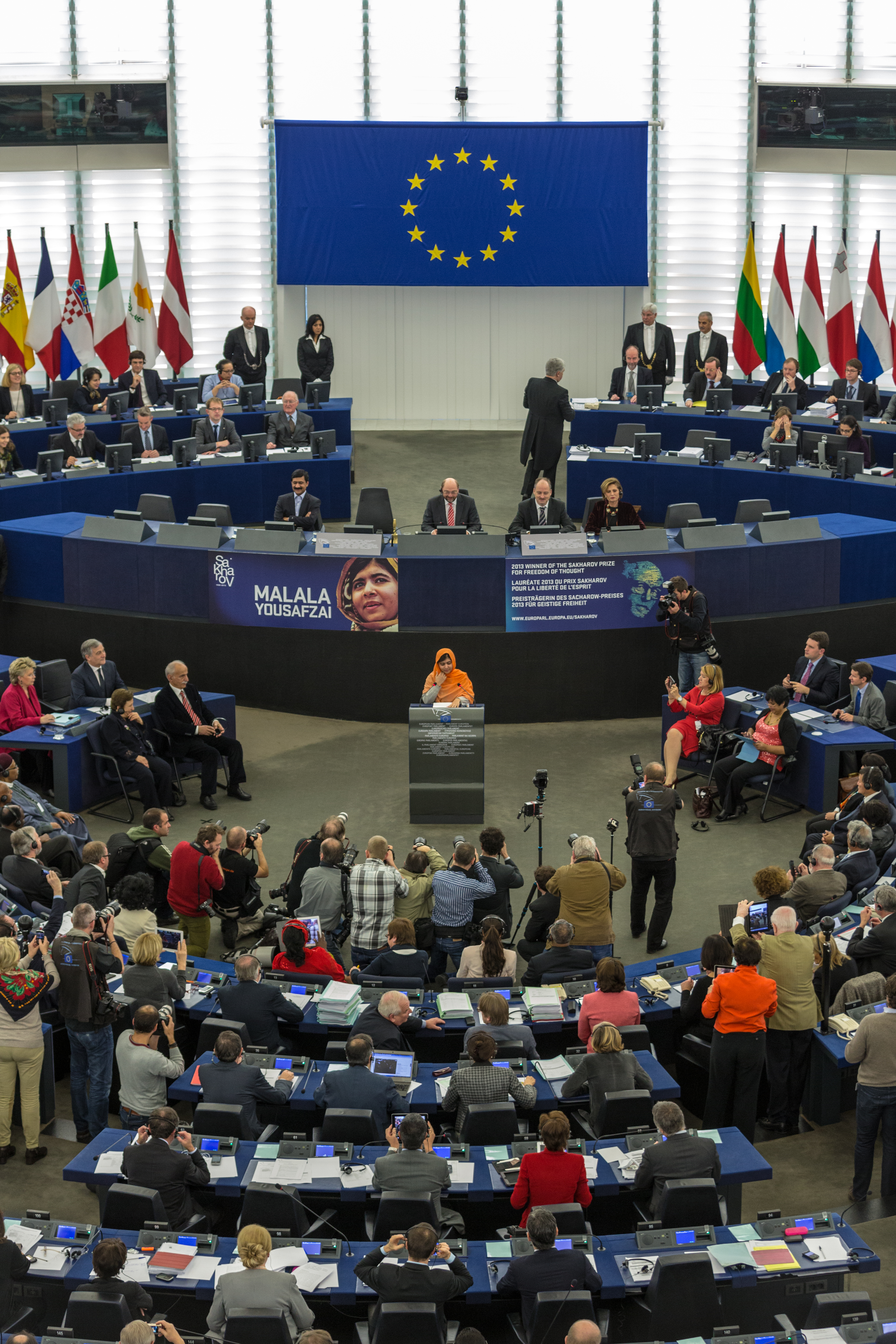 Remise du Prix Sakharov à Malala Yousafzai Strasbourg 20 novembre 2013